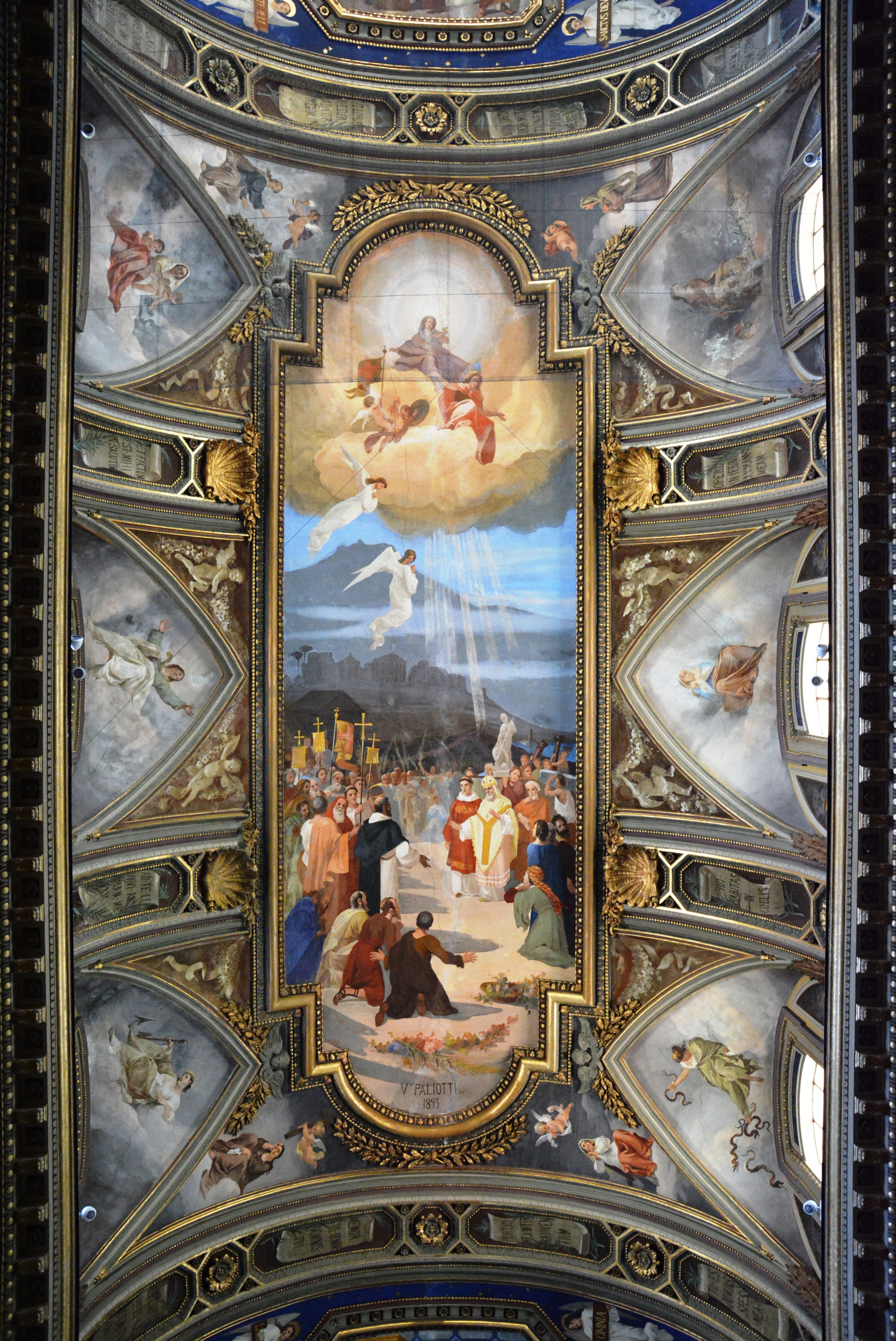 Cattedrale di Maria Santissima Assunta a Castellamma di Stabia